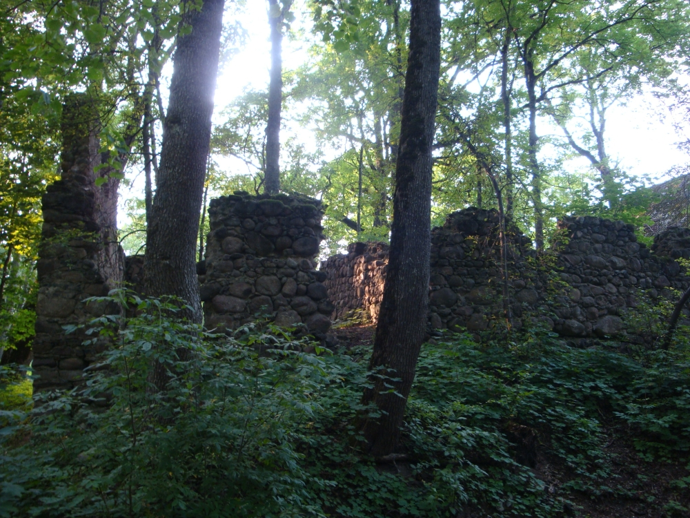 Skujeni ordulinnuse varemed.